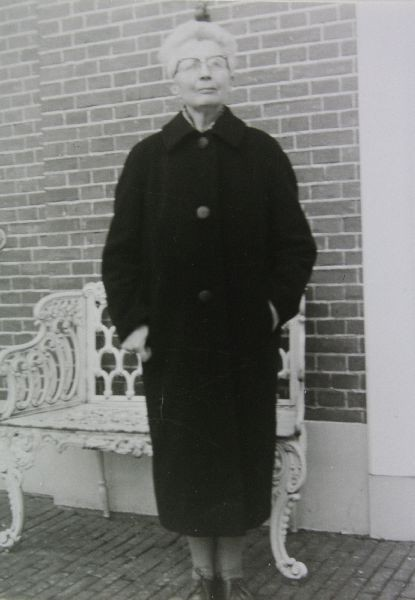 Ida Gerhardt staande voor een bankje voor Huize 't Elger in Almen (daarin woonde destijds Jeanne Bieruma Oosting (1898-1994).